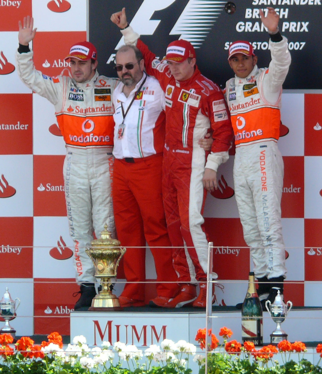 Podio de F1.left to right: Fernando Alonso, Gilles Simon, Kimi Räikkönen and Lewis Hamilton